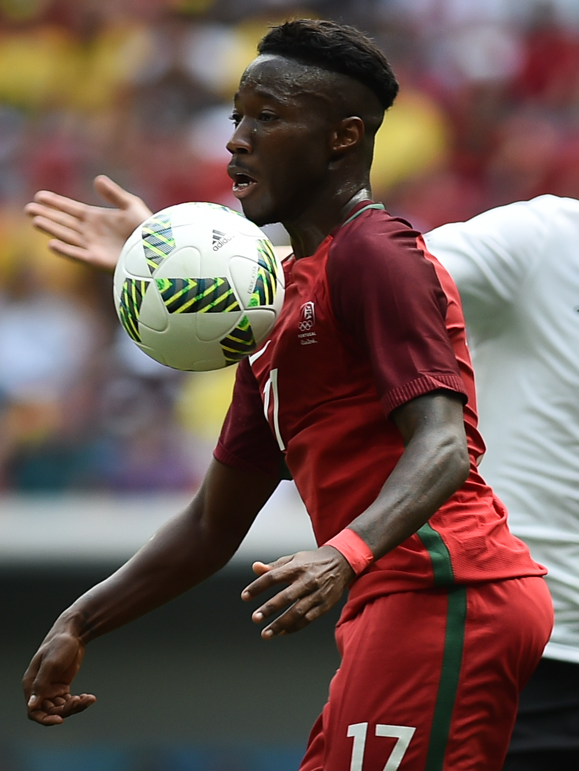 Estádio Nacional de Brasília Mané Garrincha, Brasília, DF, Brasil, 13/8/2016 Foto: Andre Borges/Agência Brasília Portigal e Alemanha jogam neste sábado (12), no Estádio Mané Garrincha, pelas quartas de final do futebol masculino nas Olimpíadas 2016.